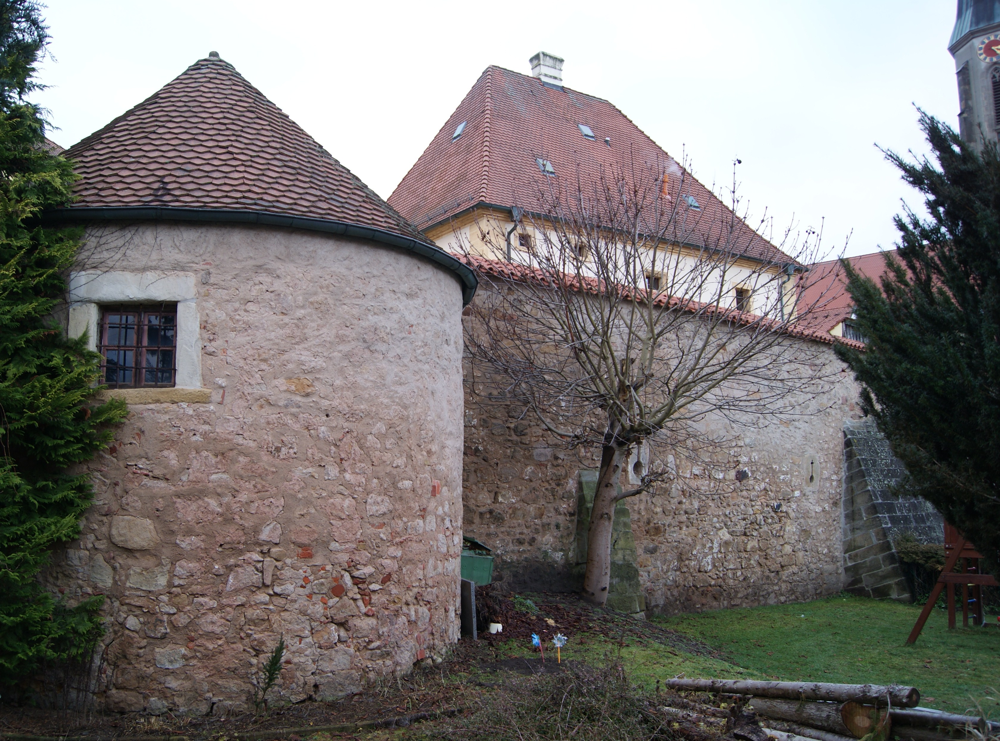 Kemnath, Trautenbergstraße 36; D-3-77-129-46; Zwingermauer mit Turm, im Kern zweite Hälfte 14. Jahrhundert; Landrichterliche Fronveste